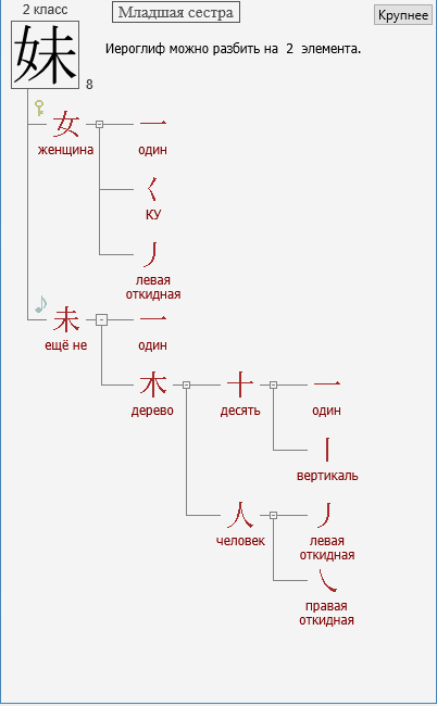 Демонстрация совместной работы фонетического словаря и словаря иероглифов.